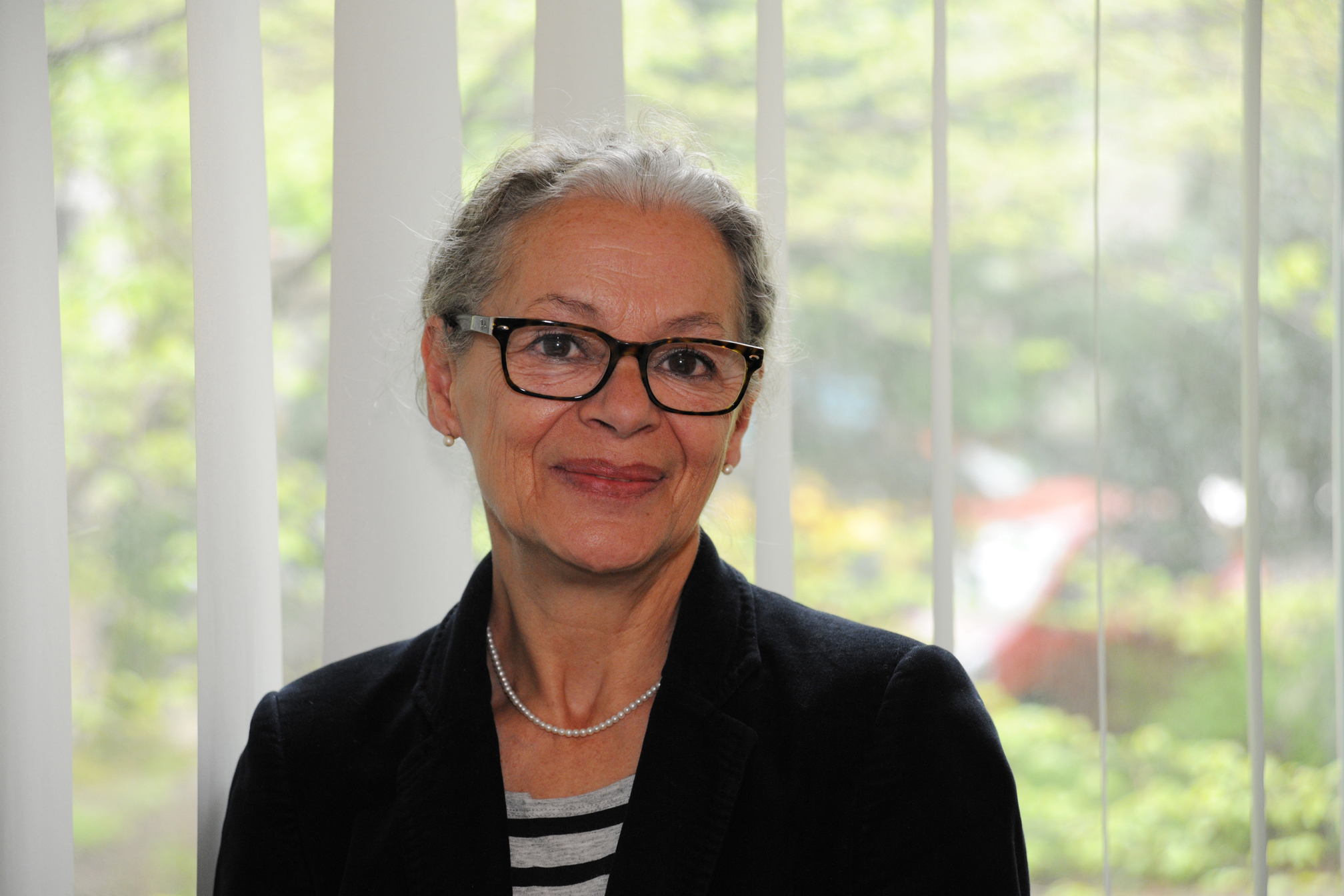 Gabriele Beger, Leitende Direktorin der Staats- und Universitätsbibliothek Hamburg